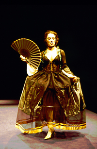 La zorra ilustrada, representación en la RESAD.